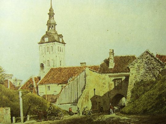 Tallinna linnamüüri Harju värav.